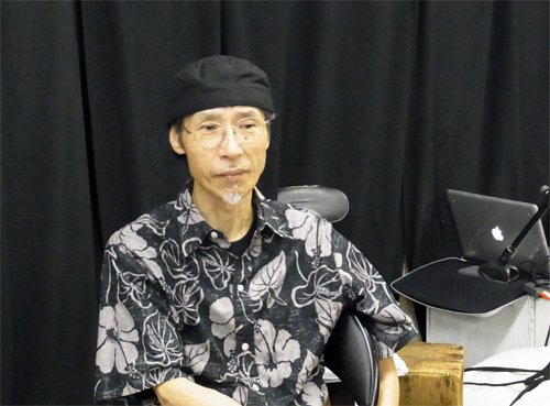 岡井のプロフィ－ル